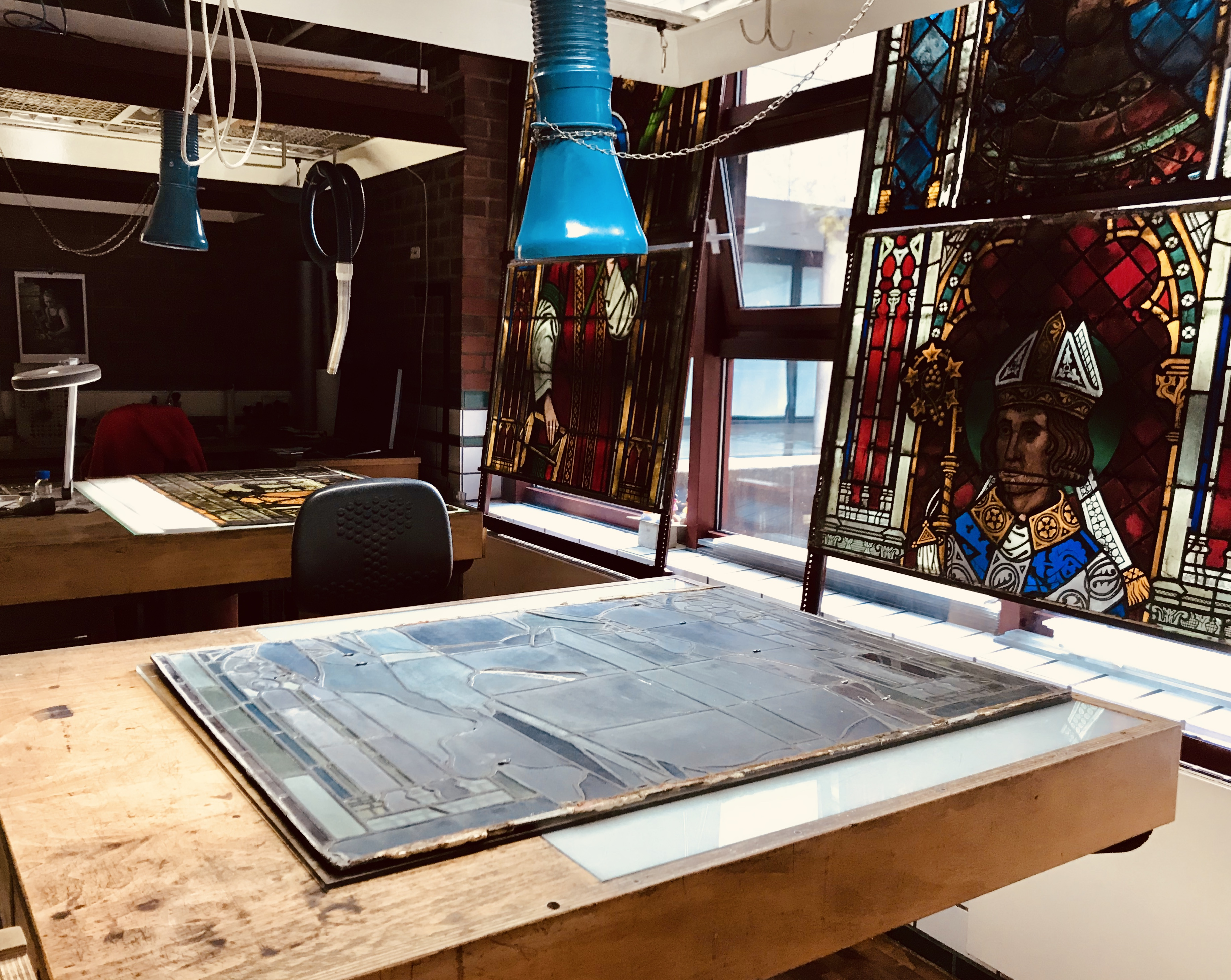 Die Glasrestaurierungswerkstatt entfernt Staub, Russ und Schmutzkrusten. Alle Restaurierungen (Zustand von Glas, Bemalung und Blei vor und nach der Restaurierung) werden dokumentiert.